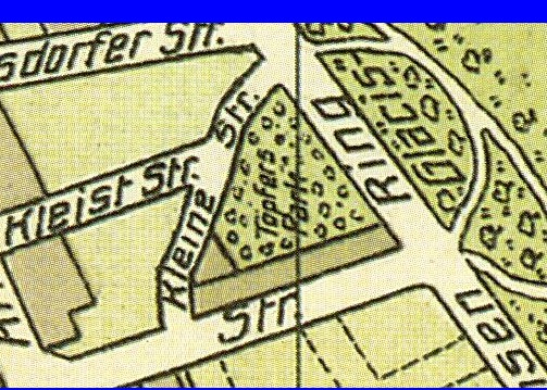 Toepffers Park, ehemalige Parkanlage in Magdeburg, Stadtteil Stadtfeld Ost